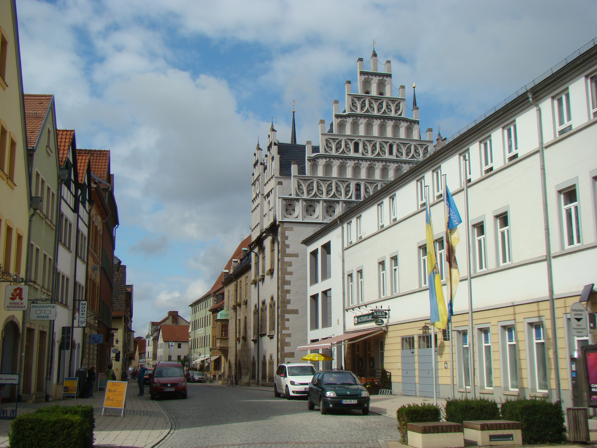 Neustadt an der Orla, Fassadendetails im Stadtbild, mit Rathausgiebel